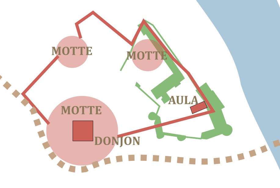 Plan schématique du château de Laval au XIème siècle, superposé au château actuel (en vert). La ligne en pointillé figure la voie romaine Le Mans-Corseul.